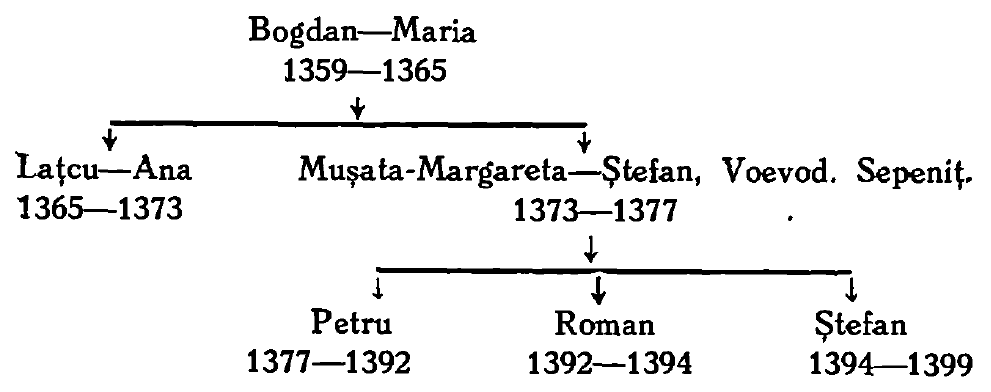 Arborele genealogic al primilor domni ai Moldovei - Diagramă realizată pe baza informaţiilor din lucrarea : Ștefan Pascu, Contribuțiuni documentare la istoria românilor în secolele XIII-XIV, Tipografia „Cartea Românească din Cluj”, Sibiu, 1944